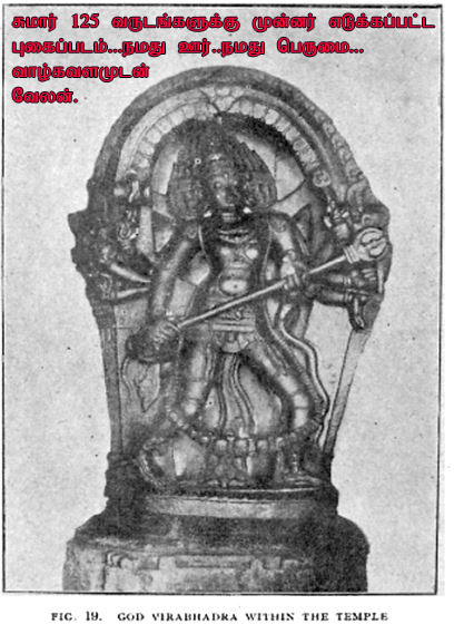 திருக்கழுக்குன்றம் கோயிலில் அமைந்துள்ள அகோரவீரபத்திரர்.